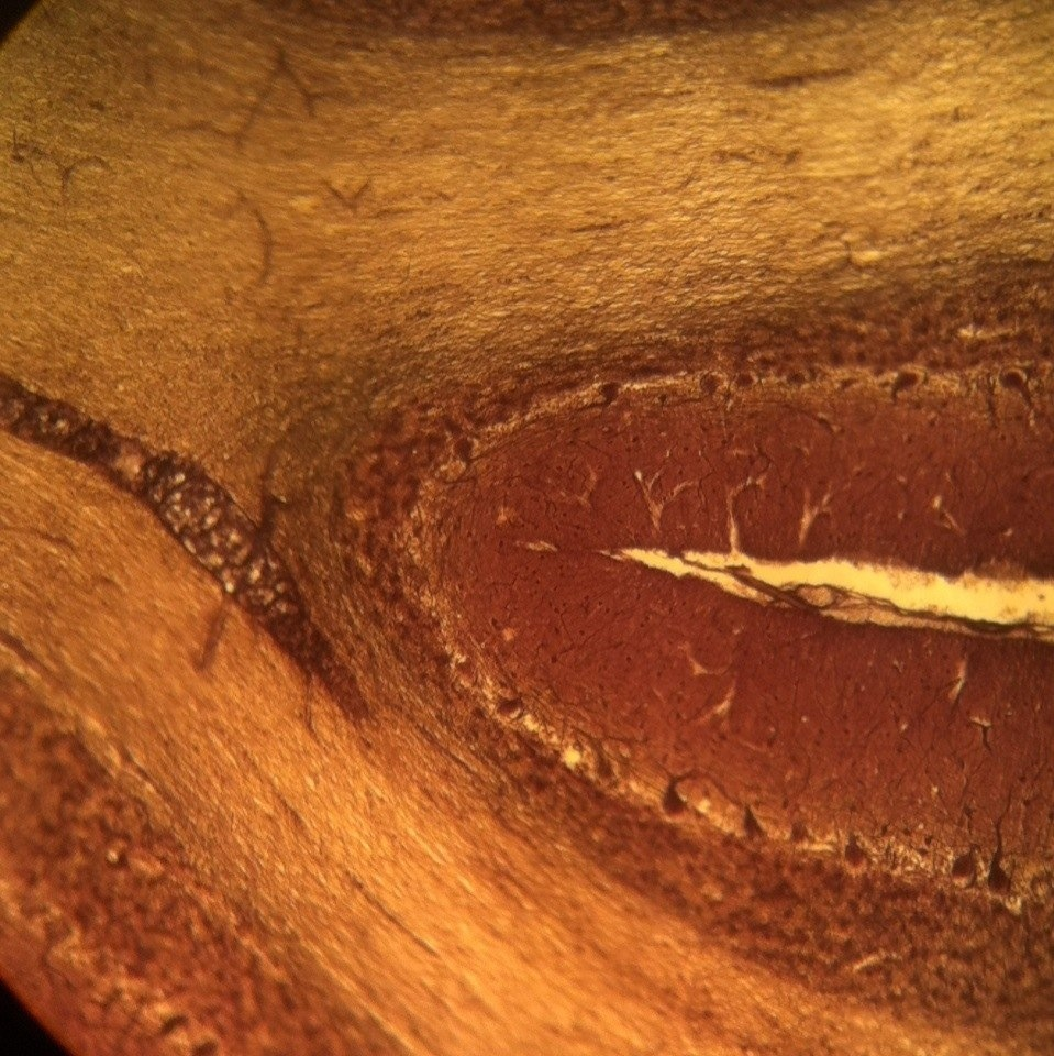 Гистологический срез коры мозжечка собаки, импрегнация нитратом серебра